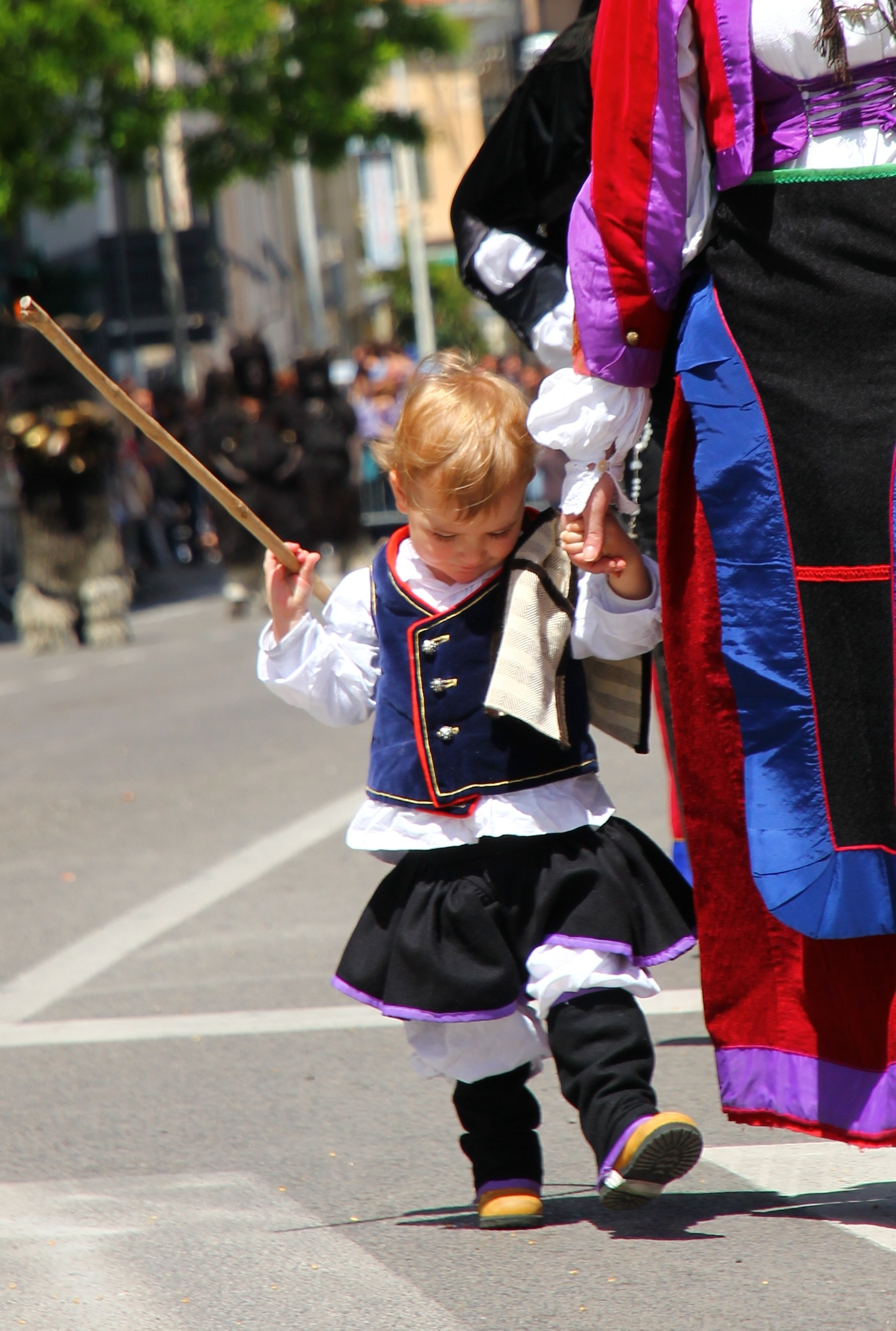 Cavalcata Sarda 2013 (Sassari)